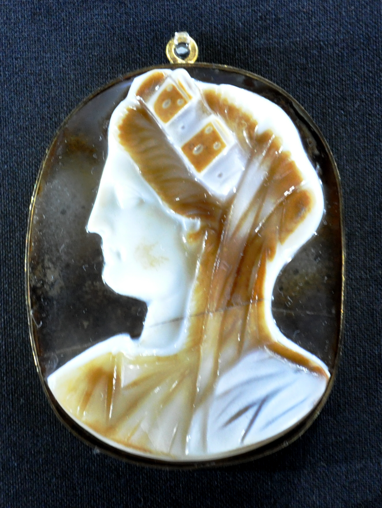 Stadtgöttin mit Mauerkrone, römisch, 4. Jh. n. Chr., Sardonyx, siebenschichtig. Antikensammlung, Kunsthistorisches Museum, Wien. Inv. Nr. IXa 82.